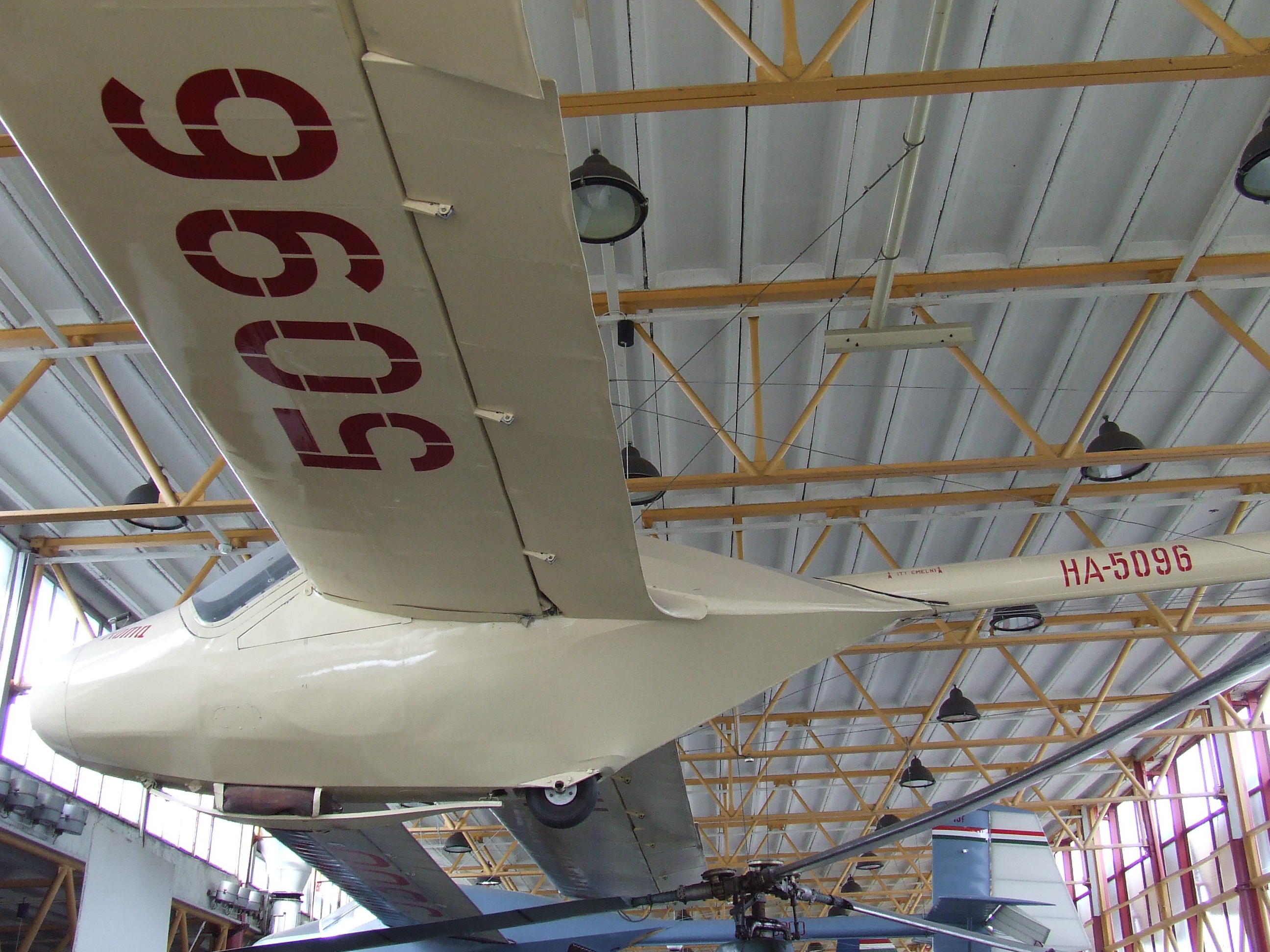 Petőfi Csarnok, Repüléstörténeti kiállítás, Rubik R-15b Koma